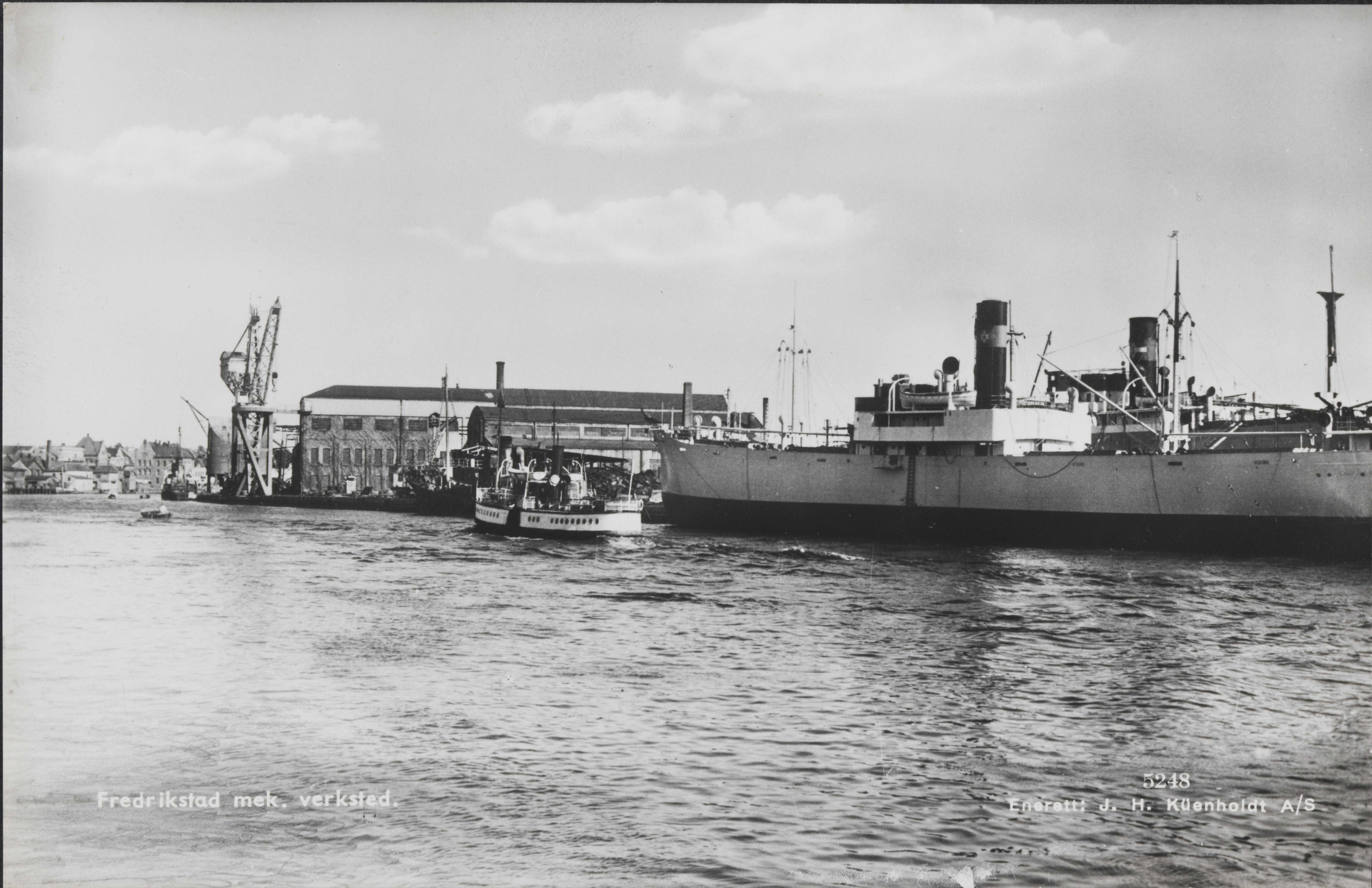 Bildet er hentet fra Nasjonalbibliotekets bildesamling